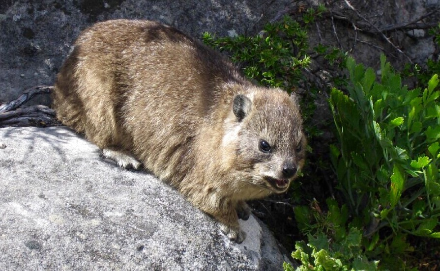 Klipschliefer auf dem Tafelberg in Kapstadt 2005